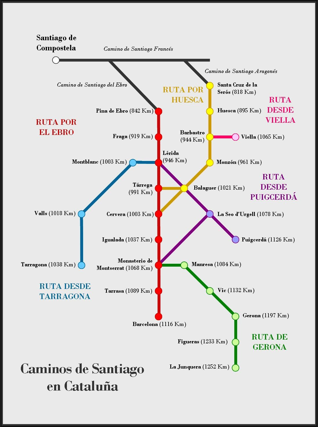 Croquis de los Caminos de Santiago en España: Rutas Catalanas